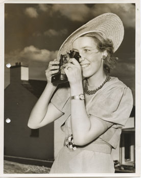 Studieresa till Amerika.